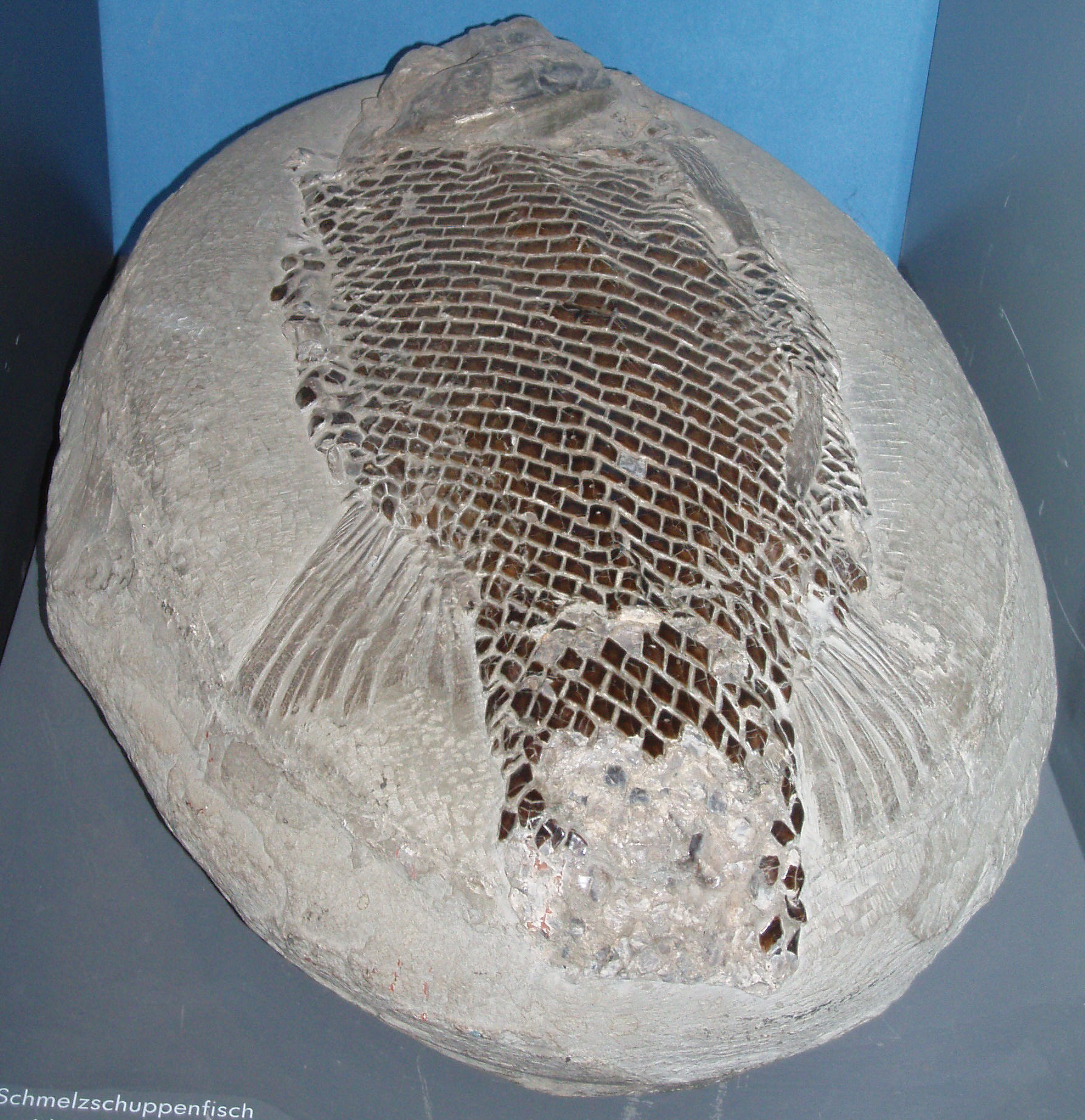 Schmelzschuppenfischversteinerung auf Schieferkonkretion